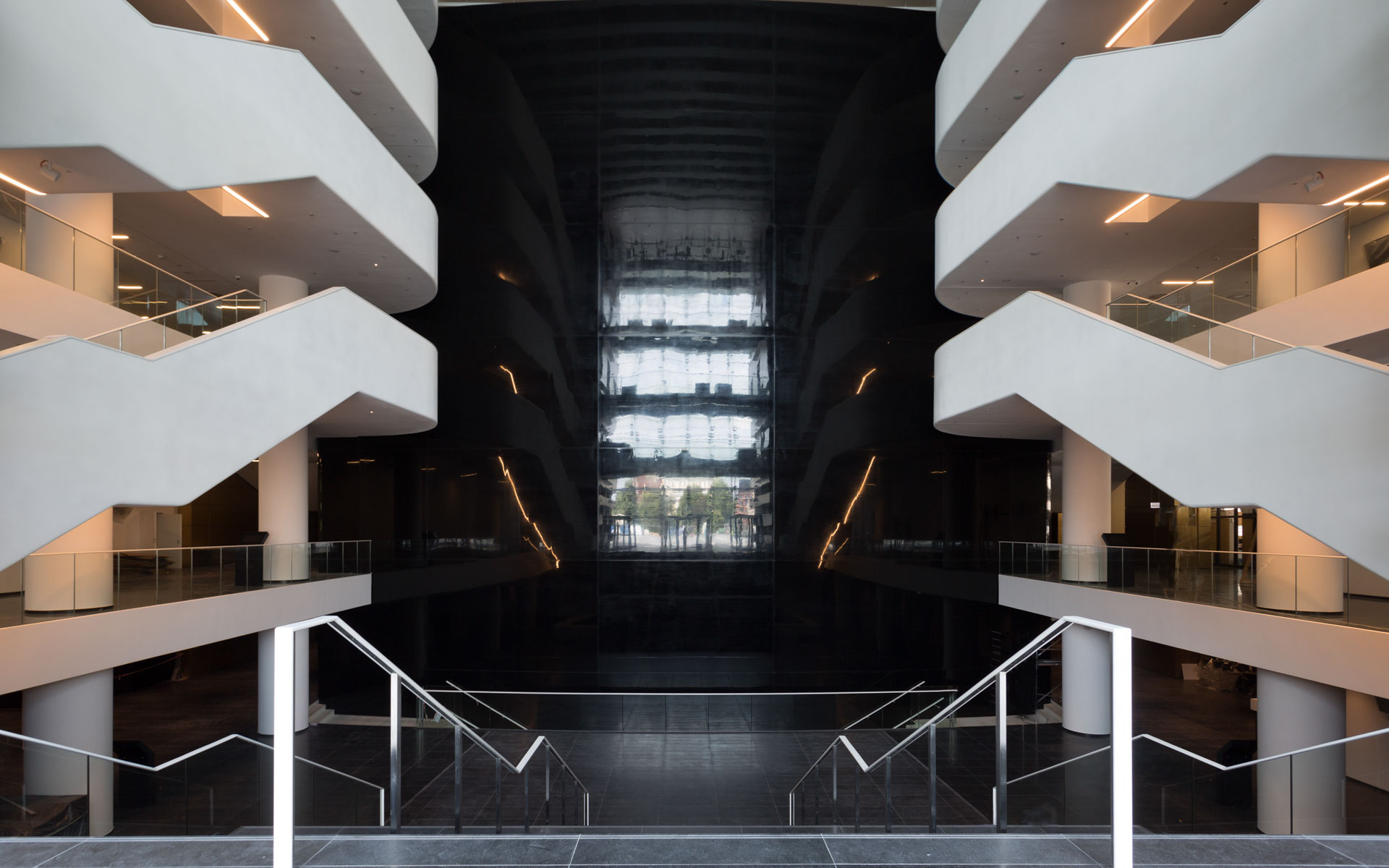 Narodowe Forum Muzyki im. Witolda Lutosławskiego we Wrocławiu